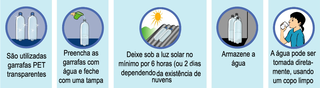 Metodologia SODIS de tratamento da água.